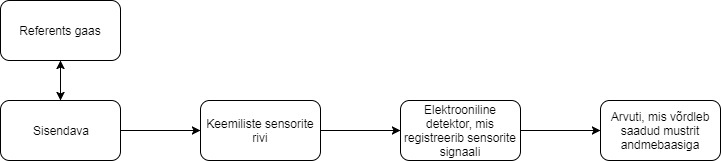 Elektroonilise nina tööpõhimõte on väga sarnane inimese ninale, võrreldakse registreeritud mustrit andmebaasis oleva mustriga ning tuvastatakse lõhn